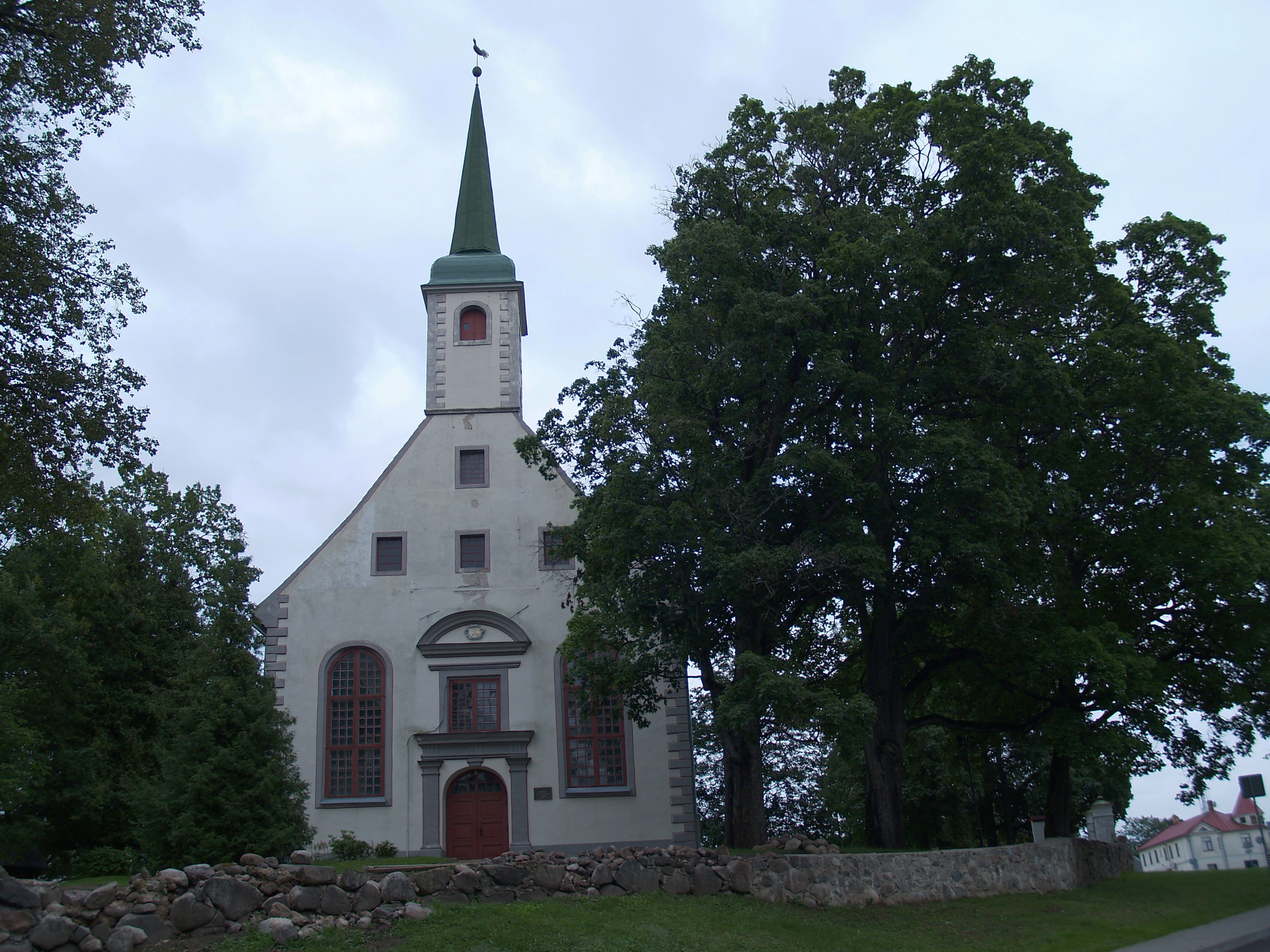 Lemsalu luteri kirik